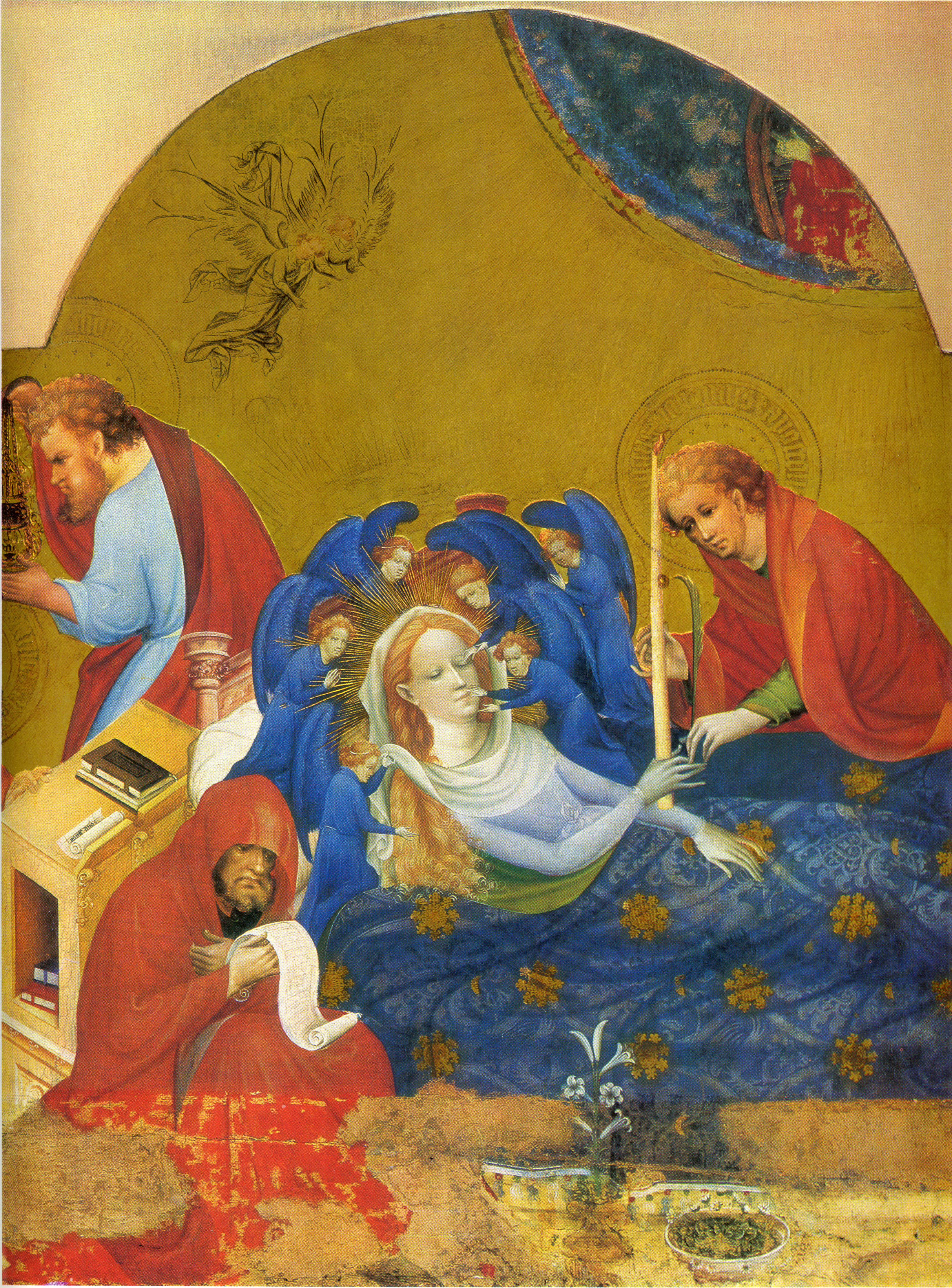 Marienalter - Mittlere Tafel